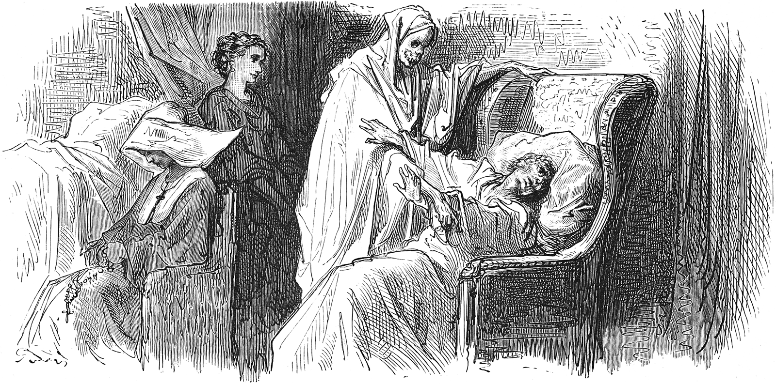 grafika z książki PL Bajki, Jean de La Fontaine, nakładem i drukiem Jana Noskowskiego, Warszawa 1876